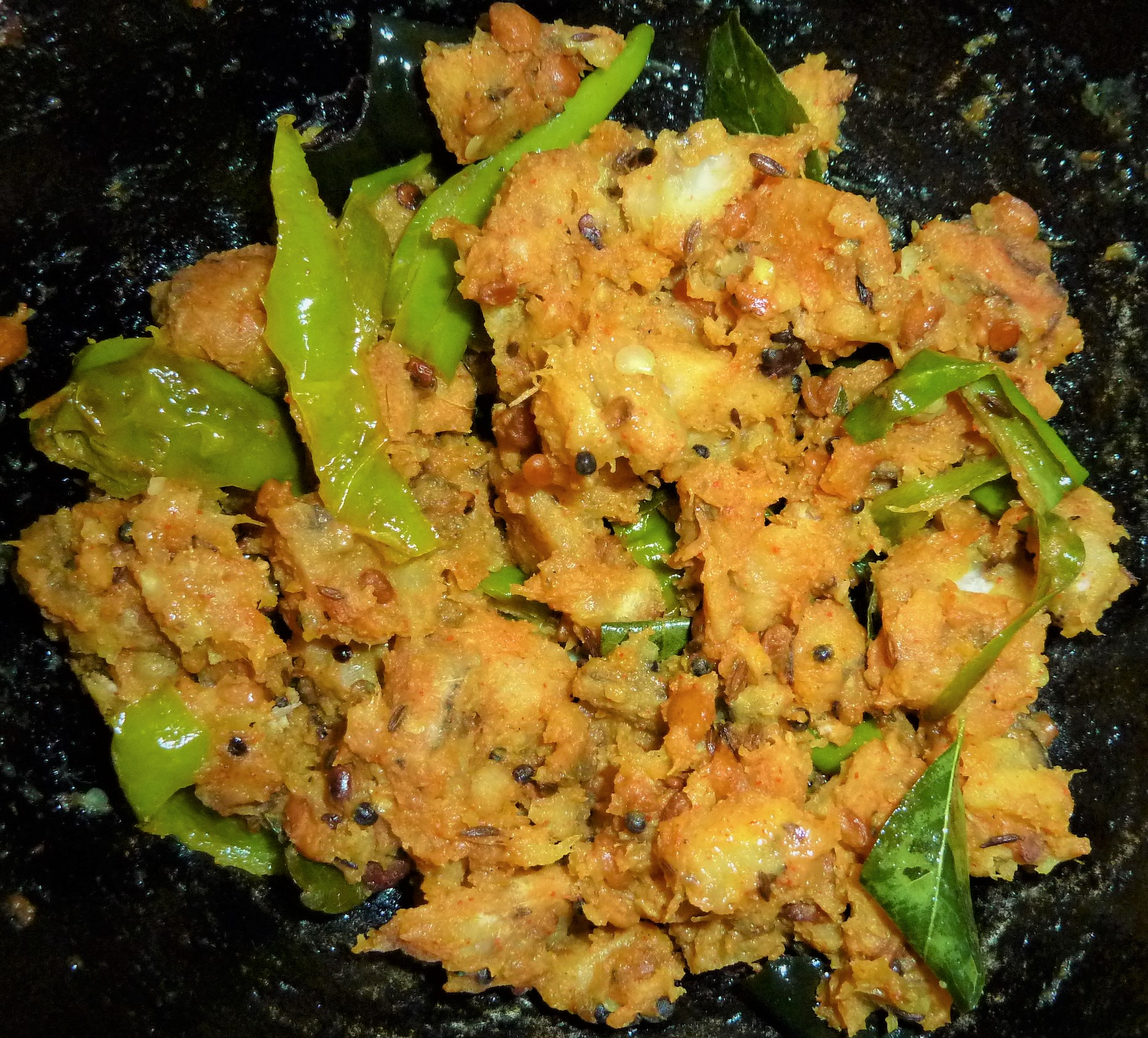 అరటికాయ మరియు నిమ్మకాయ పులుసు కూర